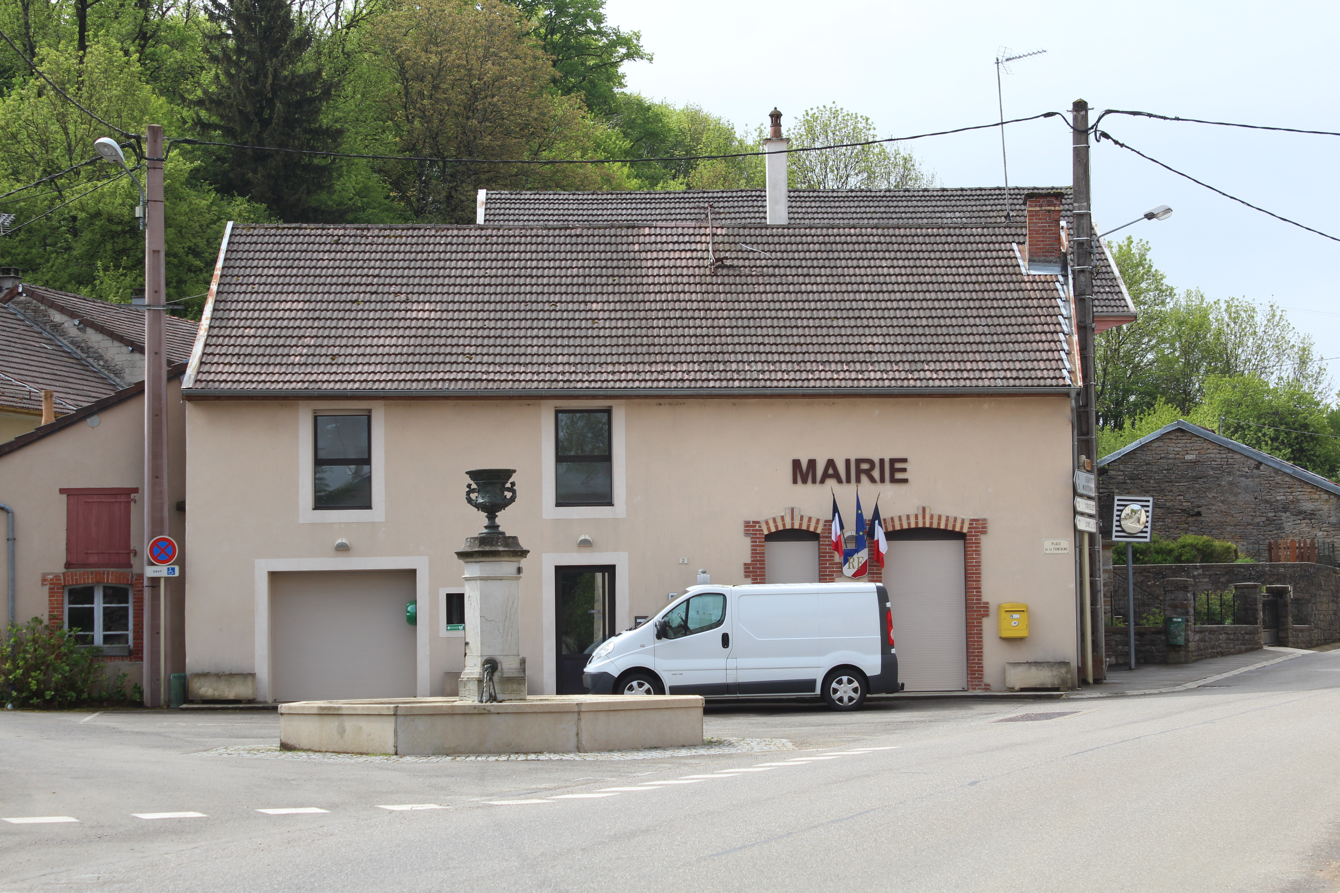 Mairie d'Augisey.